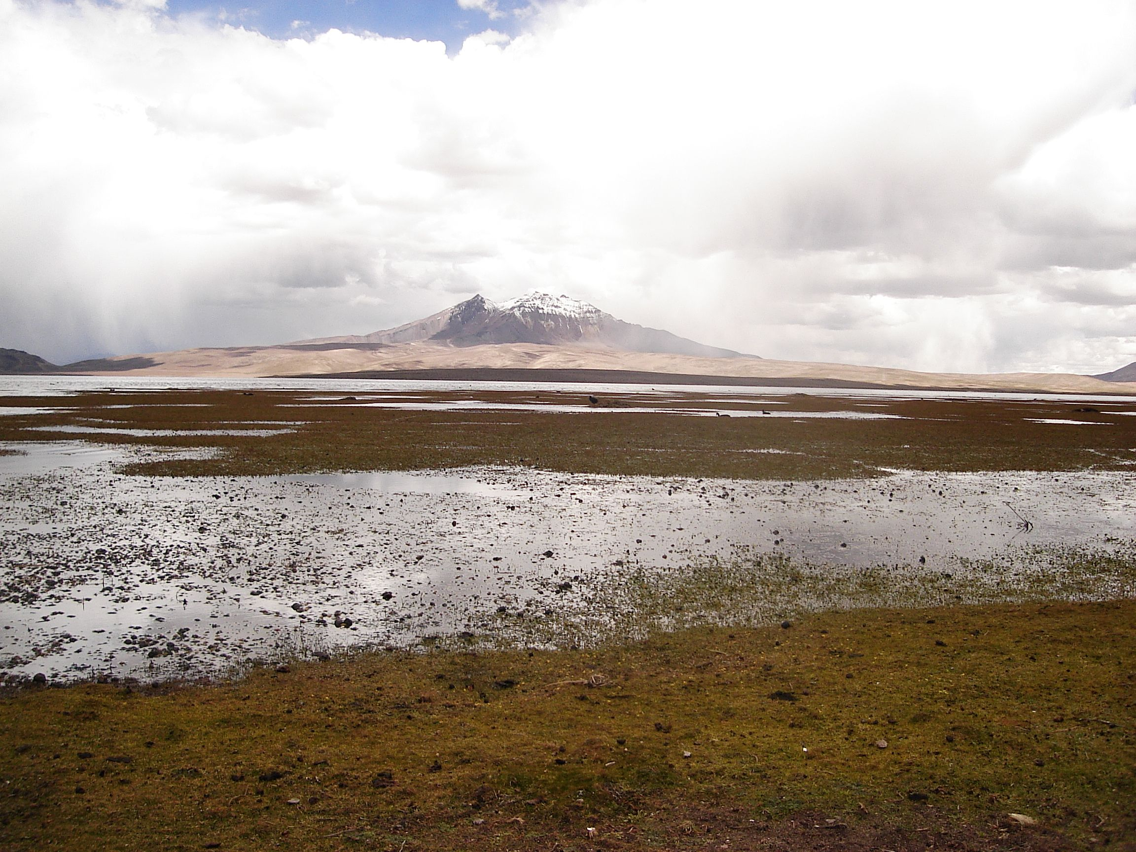 Foto tirada por mim, em Arica.